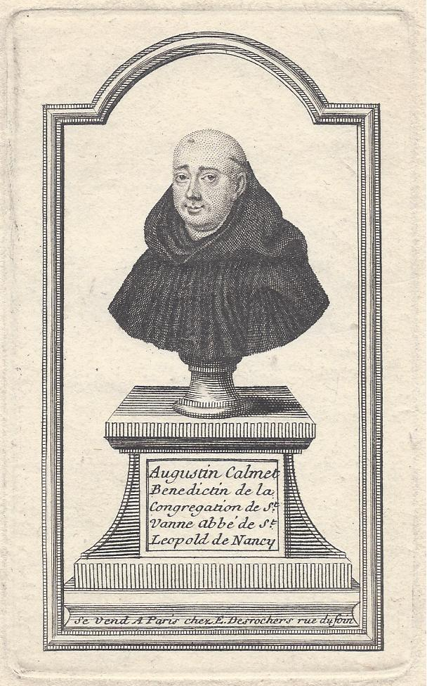 Augustin Camlet Benedictin de la Congregation de St. Vanne abbé de St. Leopold de Nancy. Kupferstich um 1720 bei Ètienne-Jehandier Desrochers, Rue du Soin, Paris